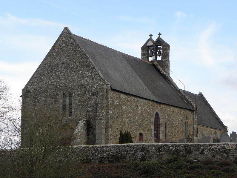 Église Saint-Georges de Saint-Georges-de-Gréhaigne (35).